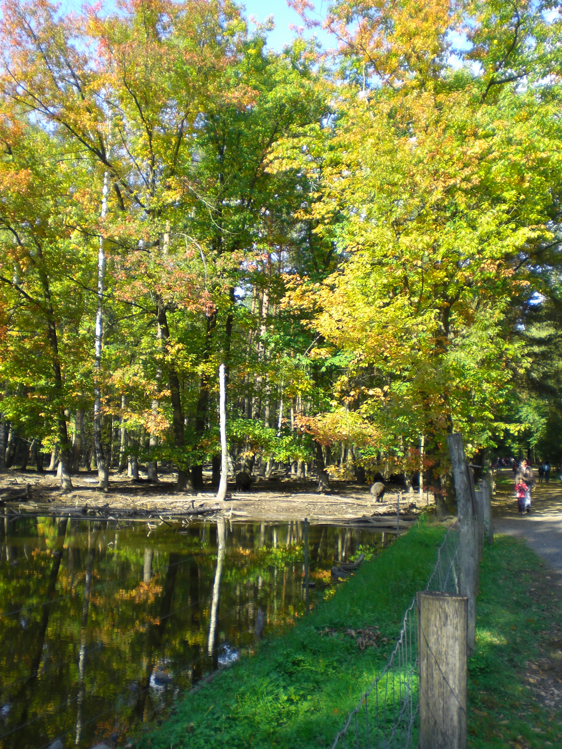 Am Wildschweingehe des Wildpark Alte Fasanerie in Hanau-Klein-Auheim